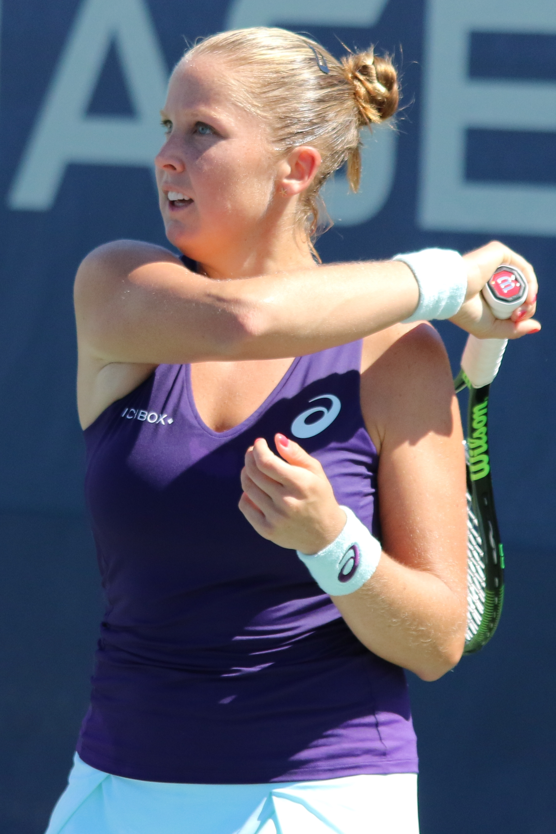 Rogers US16 (21)